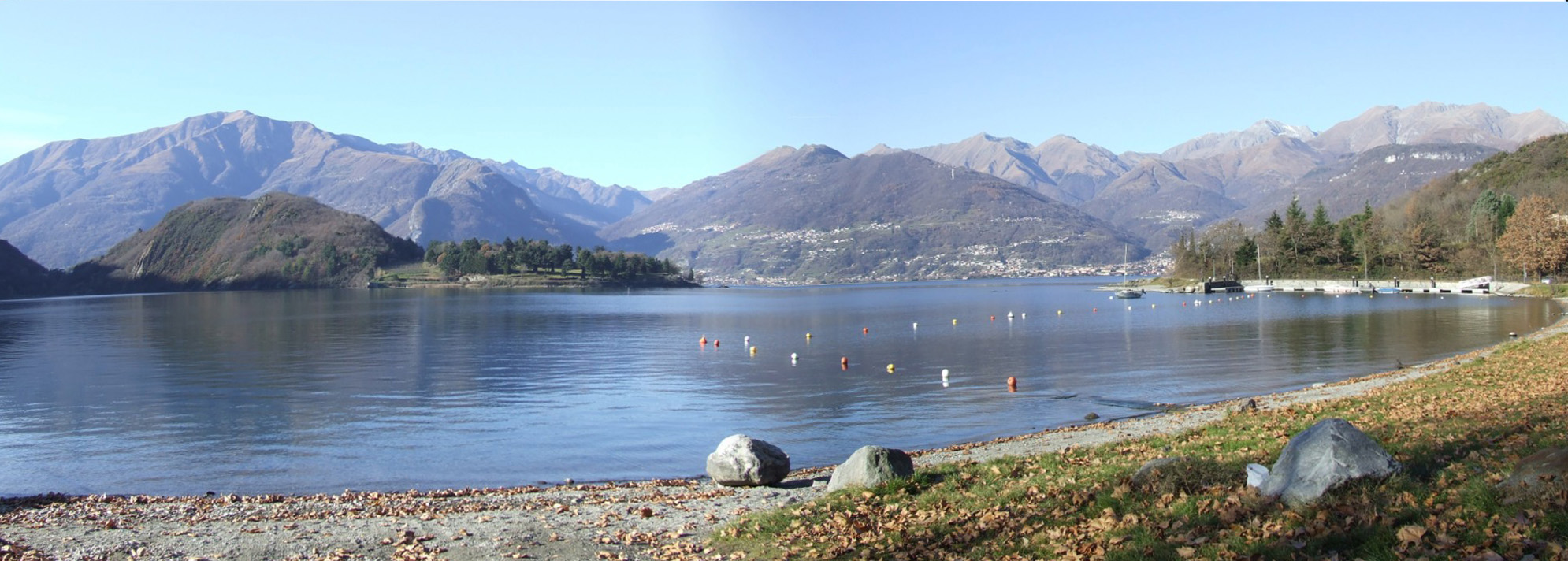 una panoramica del laghetto di piona